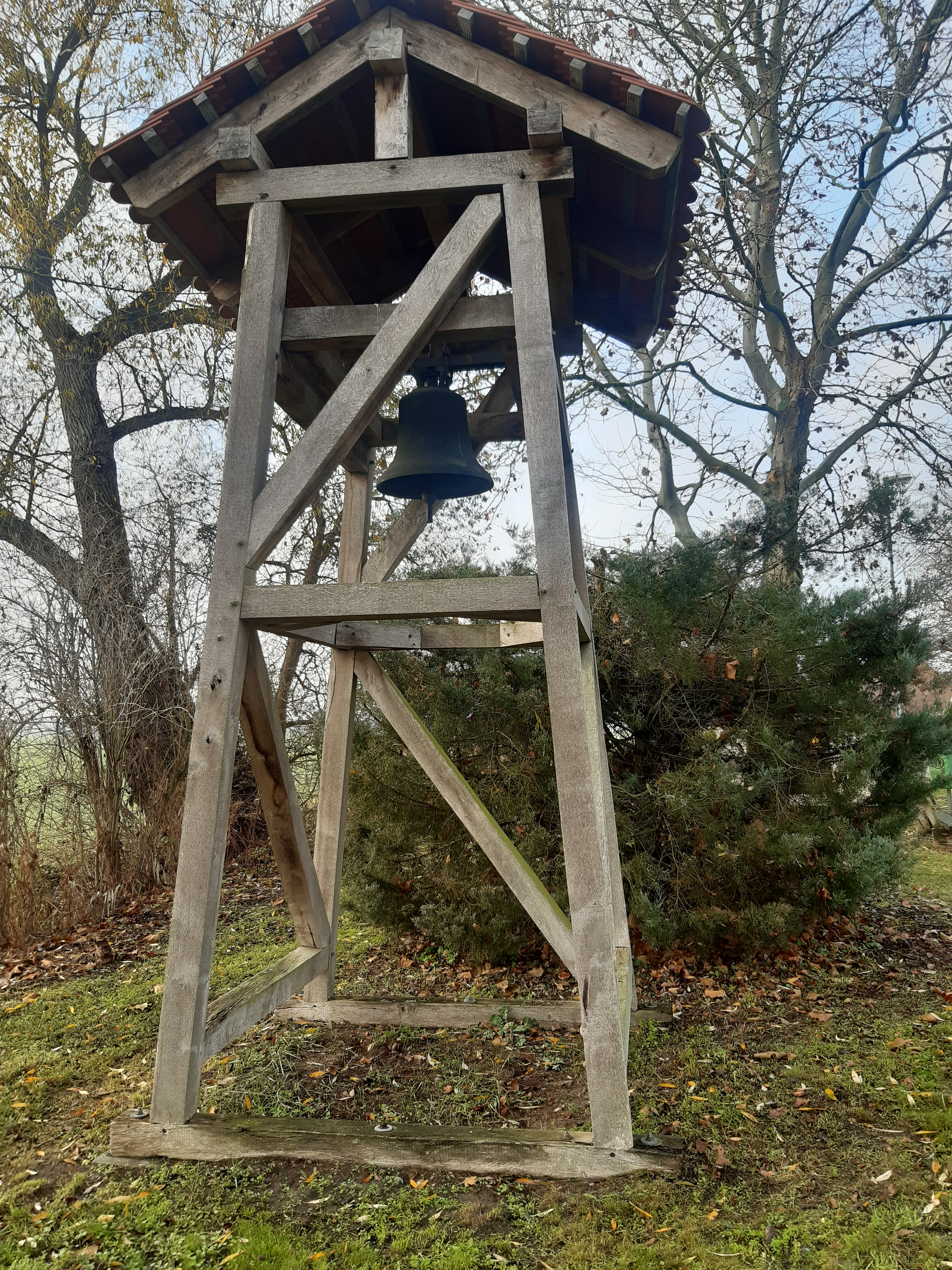 Glockenturm